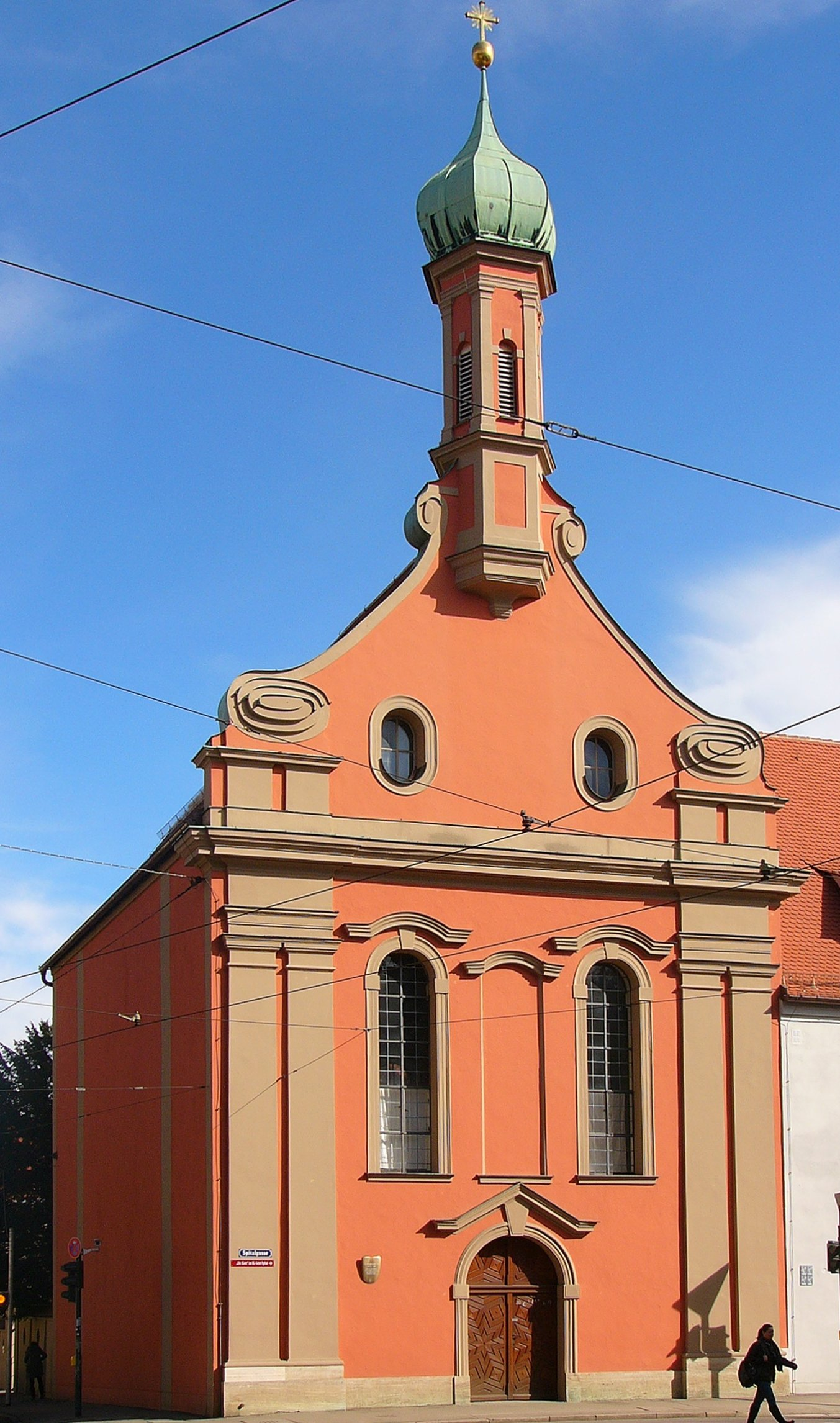 Ehem. Dominikanerinnenklosterkirche St. Margareth; jetzt Kath. Spitalkirche, Saalbau mit eingezogenem Chor, Volutengiebel mit sechseckigem Turm mit Zwiebelhaube, 1298 gegründet, Kirchenneubau 1521 und 1594, Umbau und Anlage der Westfassade mit Volutengiebel um 1720; mit Ausstattung.This is a photograph of an architectural monument.